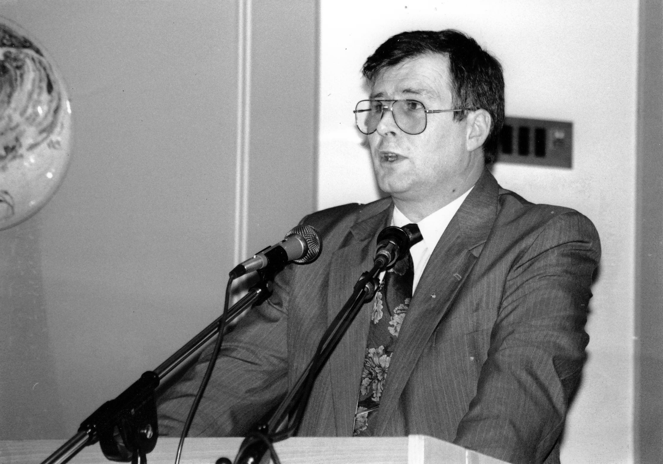 1993 - Halvar Hansen, Harstad Ap